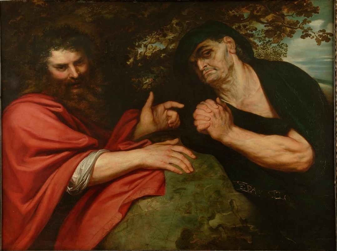 El lienzo representa a los sabios griegos Demócrito, filósofo presocrático y matemático, y a Heráclito, también filósofo.